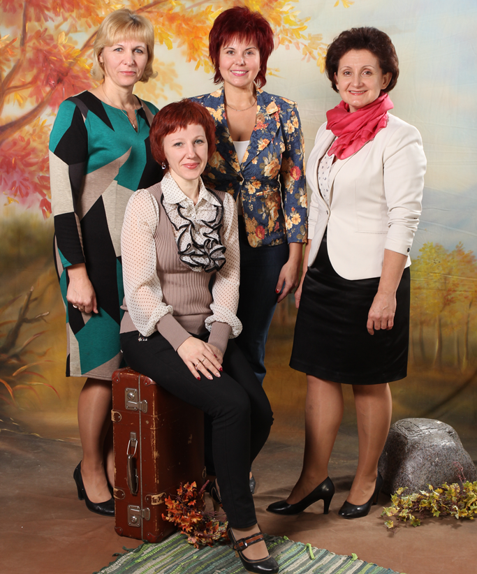 Atbalsta personāls 2014. gadā